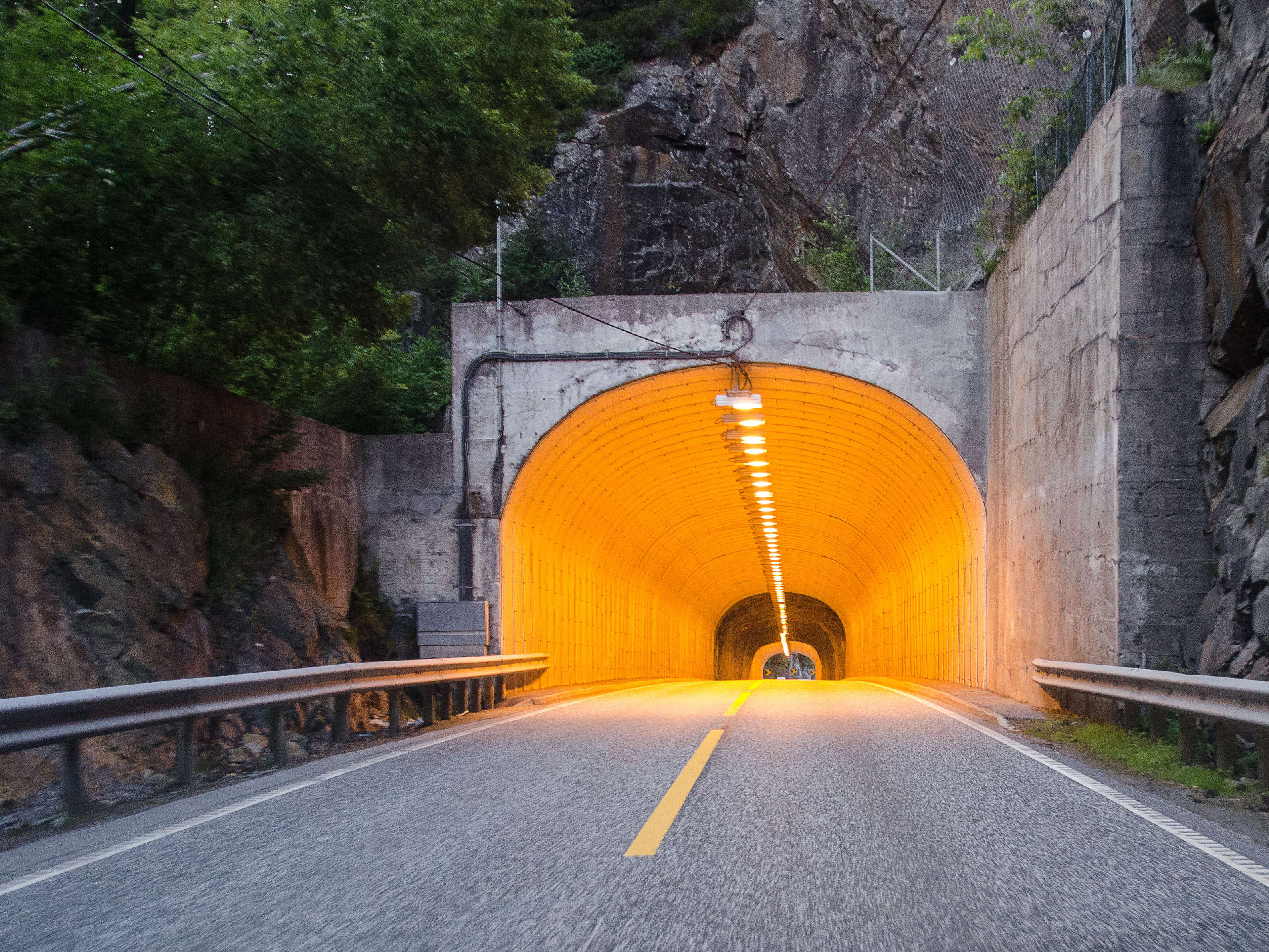 Østre Vallesverd tunnel på Rv420